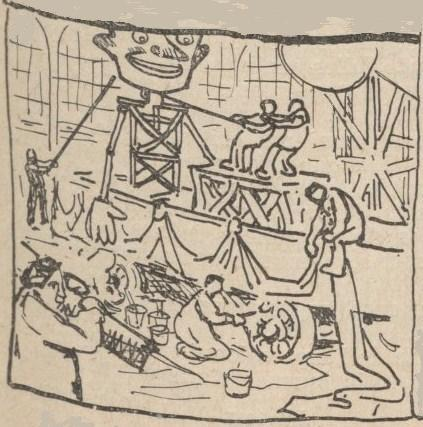 Préparation de chars pour la Mi-Carême 1922.